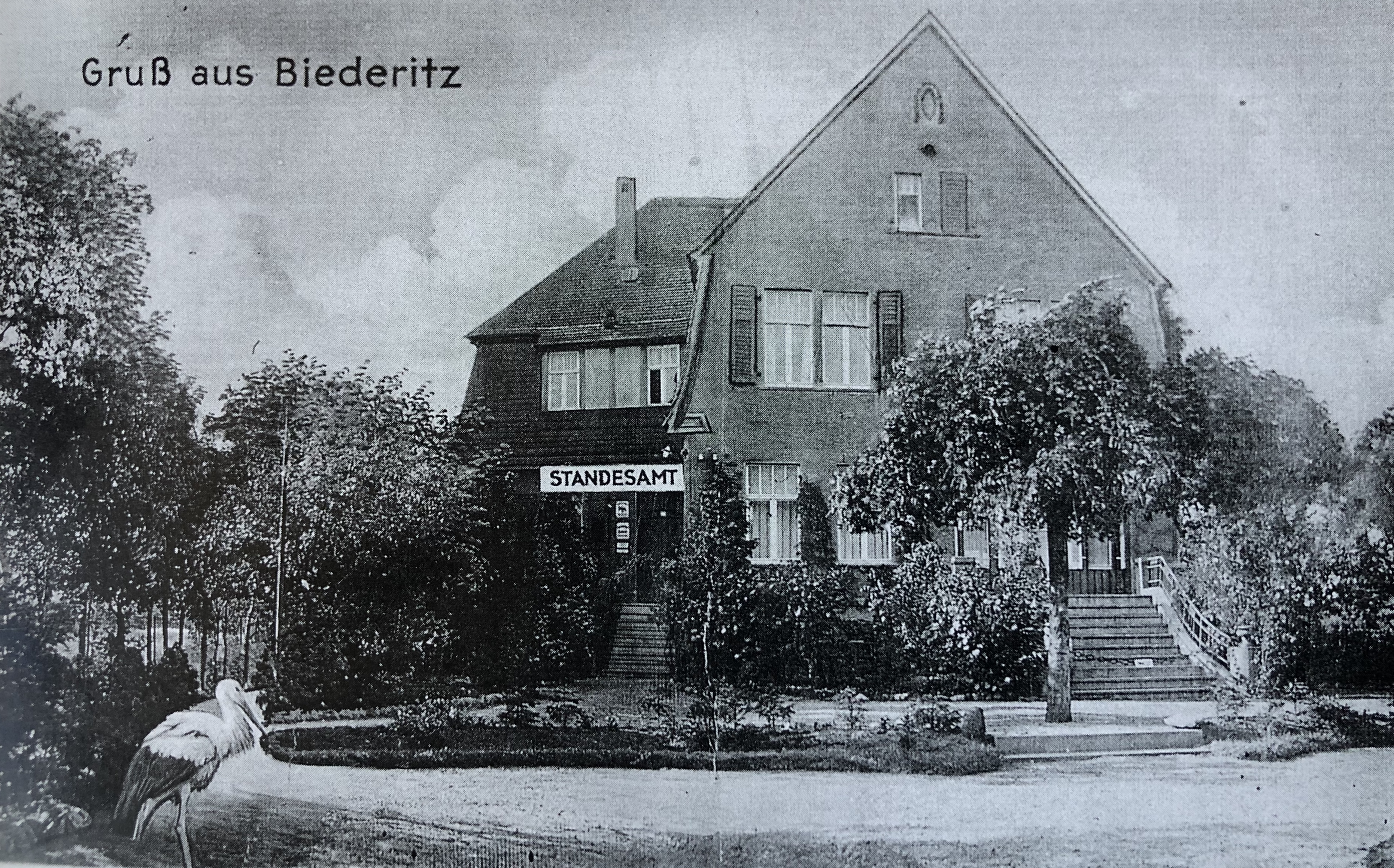 altes Gemeindehaus in Biederitz